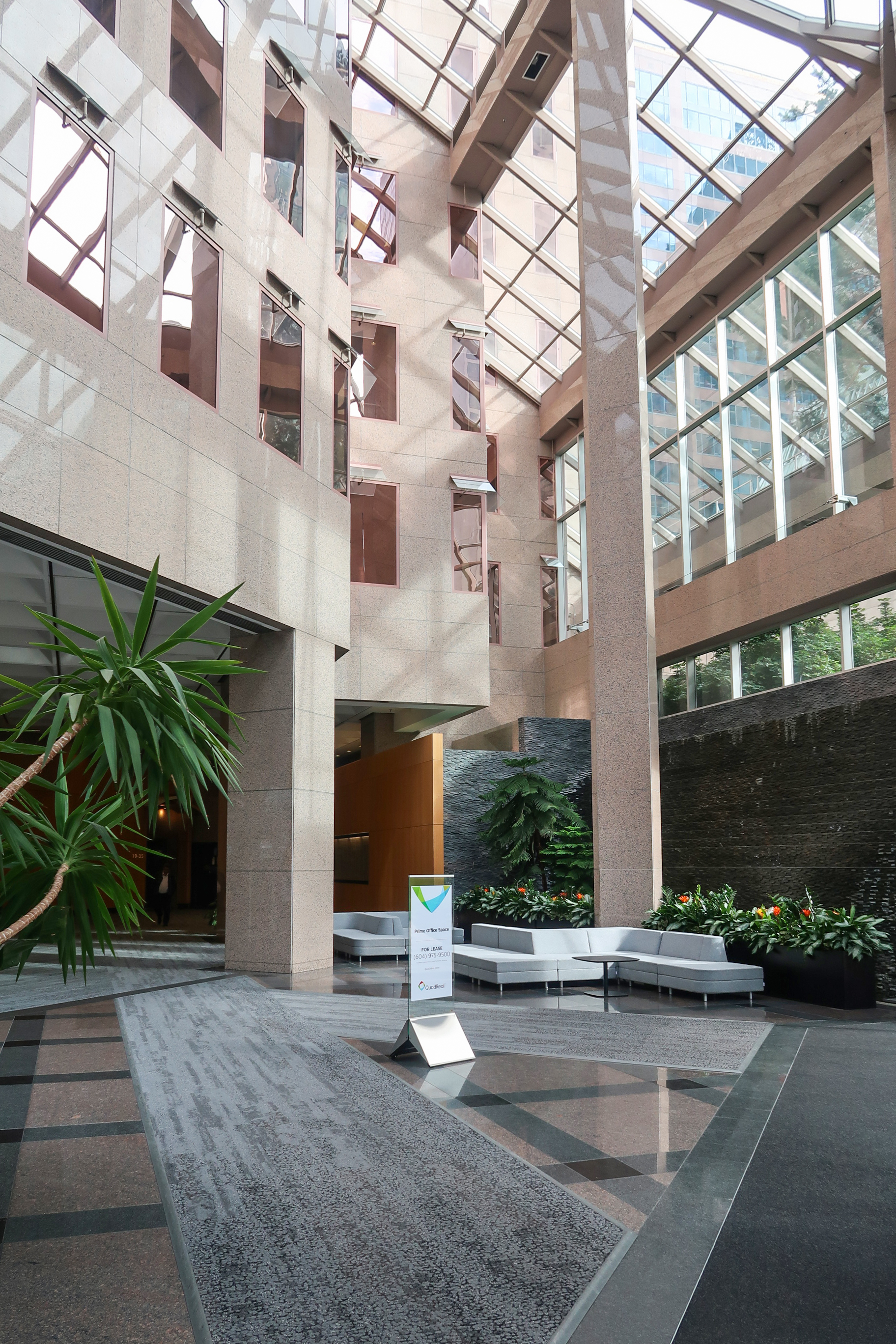 Park Place (Vancouver)